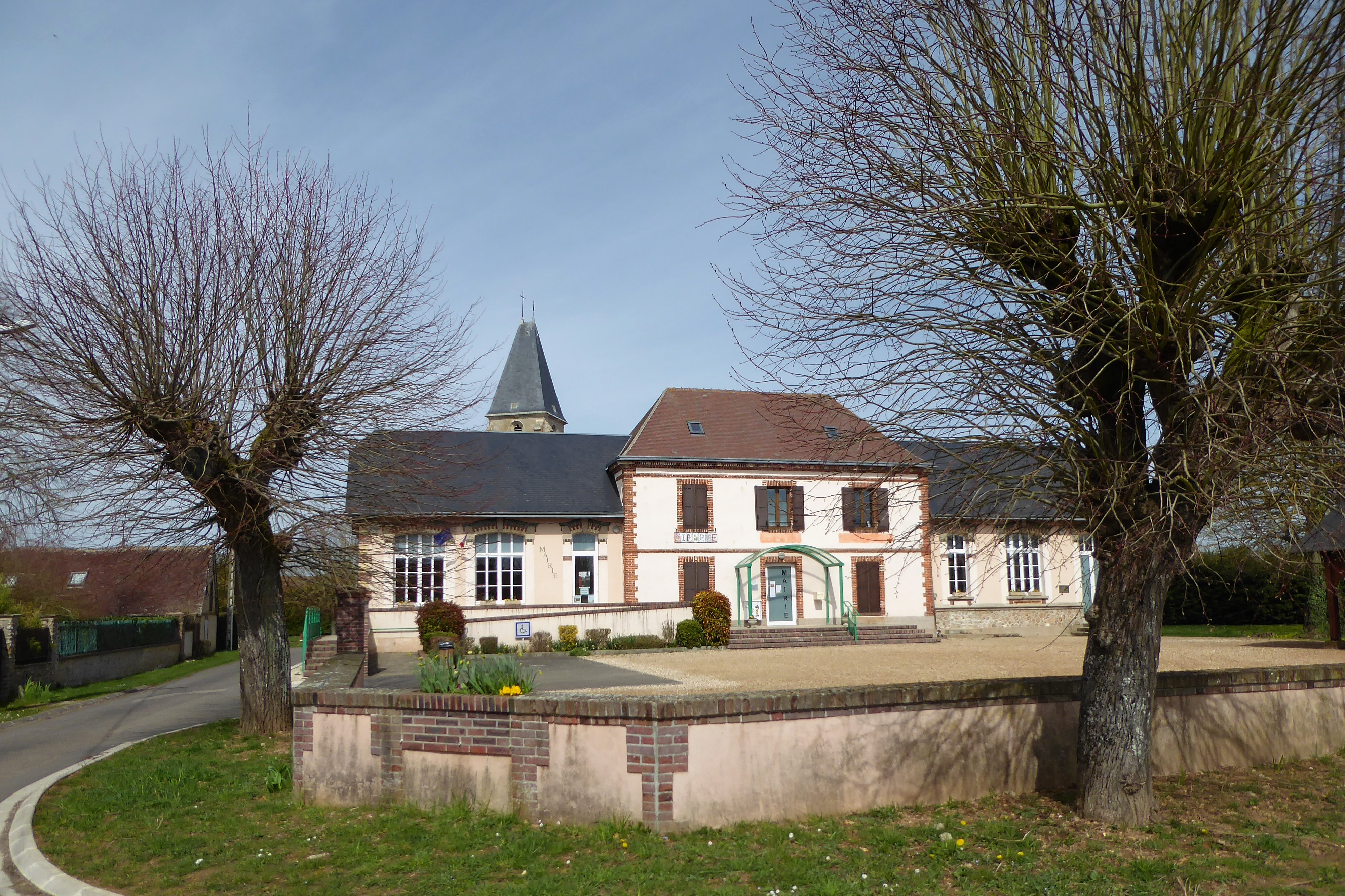 mairie-école et église Saint-Martin, Garancières-en-Drouais, Eure-et-Loir, France.